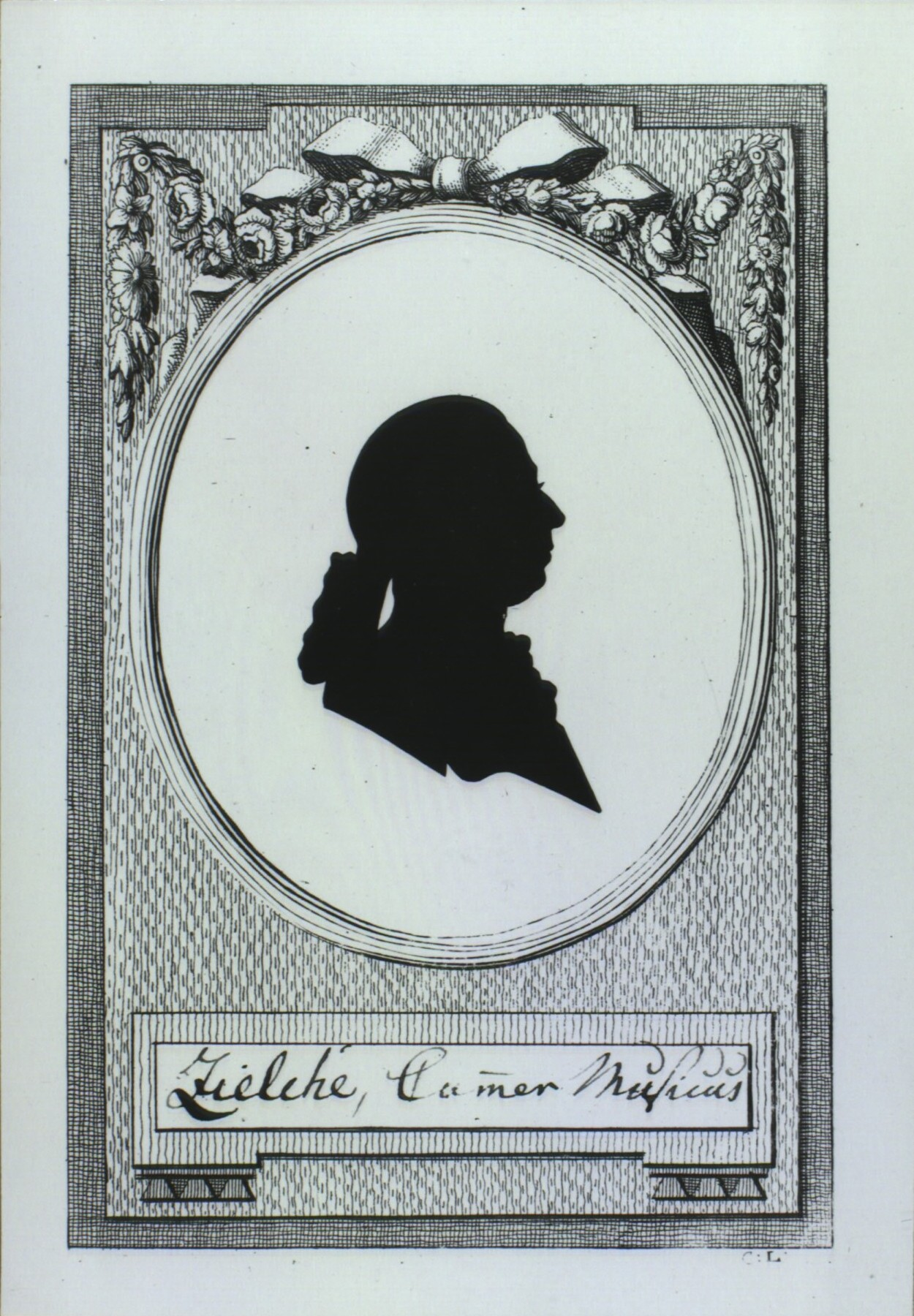 Depicted person: Hans Hinrich Zielche